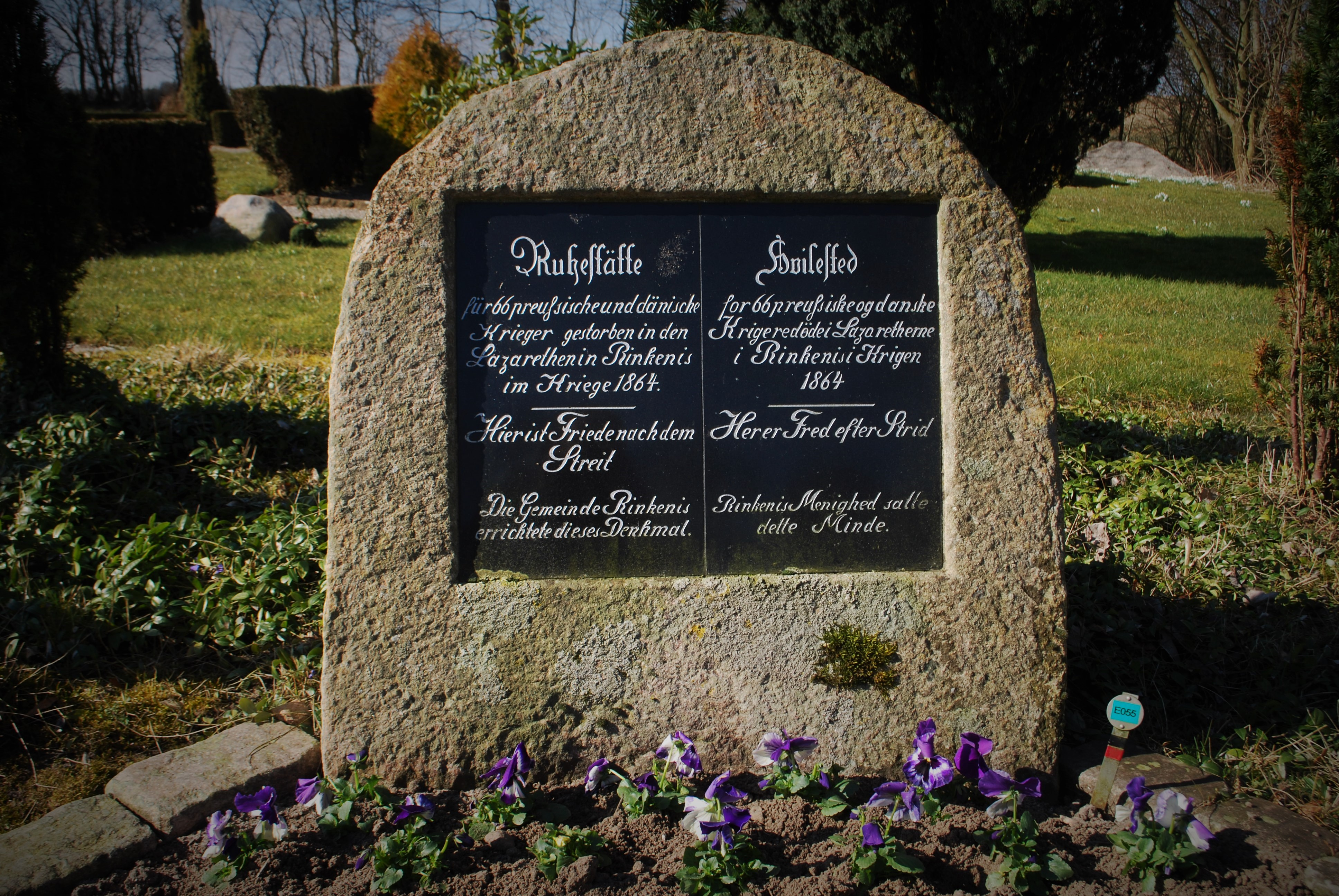 På kirkegården Gamle Rinkenæs Kirke er der en fællesgrav for 66 danske og prøjsiske soldater, der døde på lazaretter i Rinkenæs under 2. Slesvigske Krig i 1864. Monumentet der er rejst på graven er både med dansk og tysk indskrift.